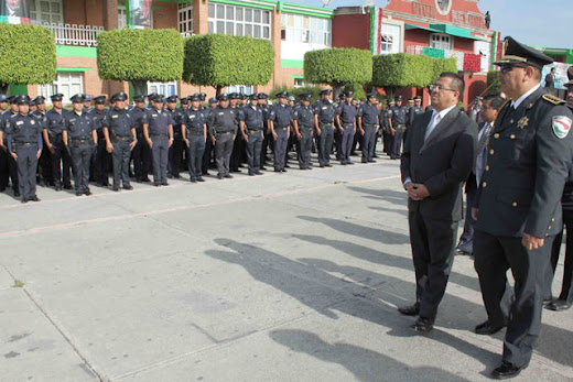 Palacio Municipal Valle De Chalco